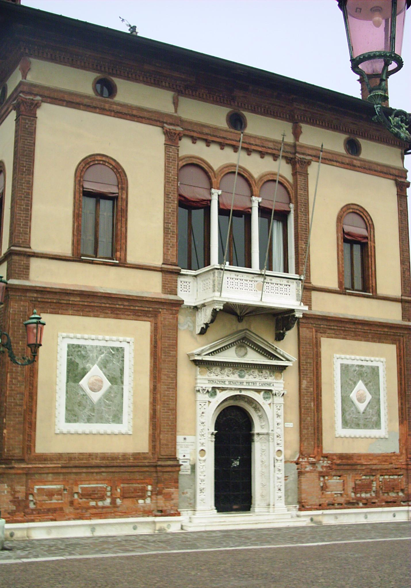 Velencei reneszánsz palazzo, Olaszország